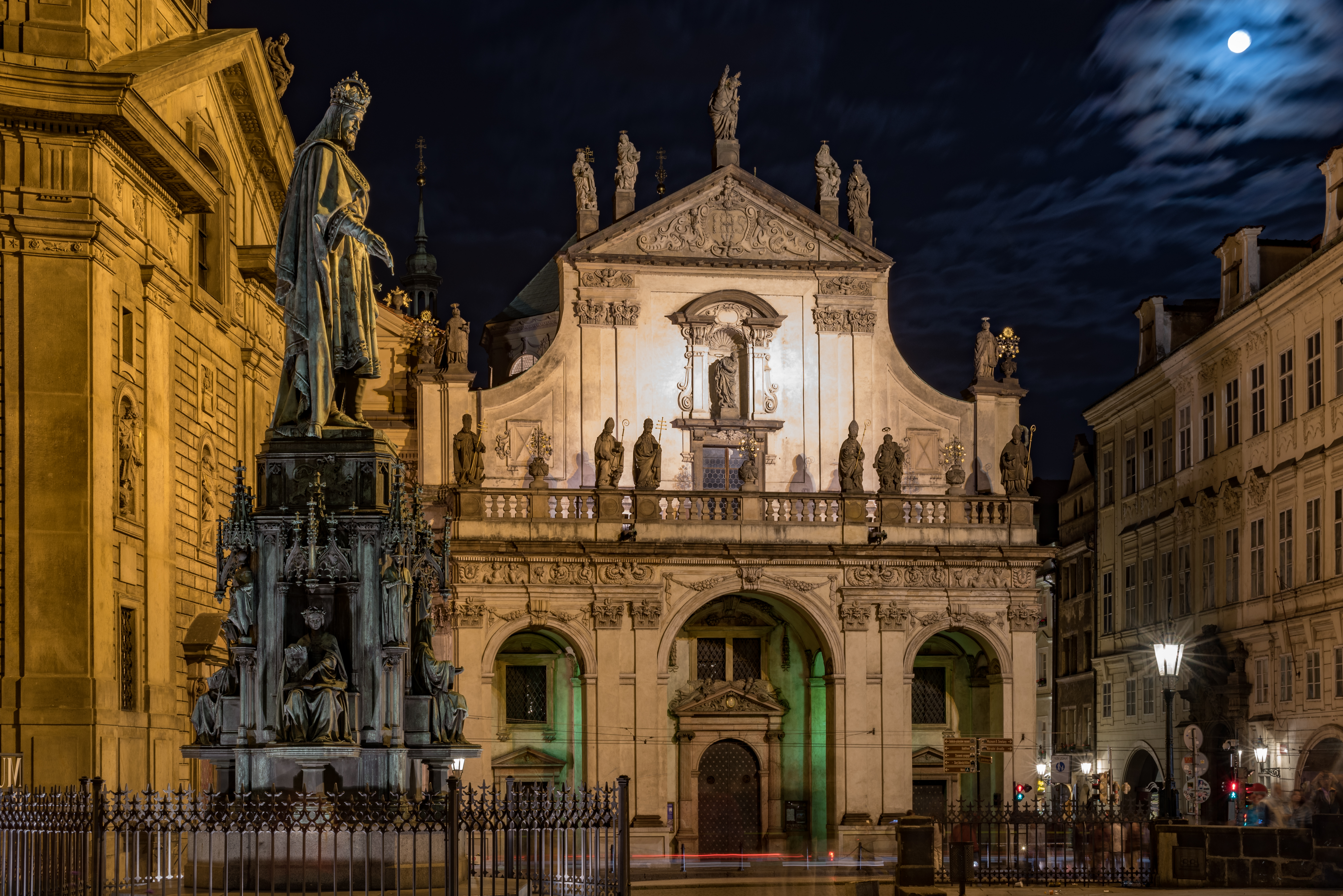 Praha, Staré Město, Klementinum